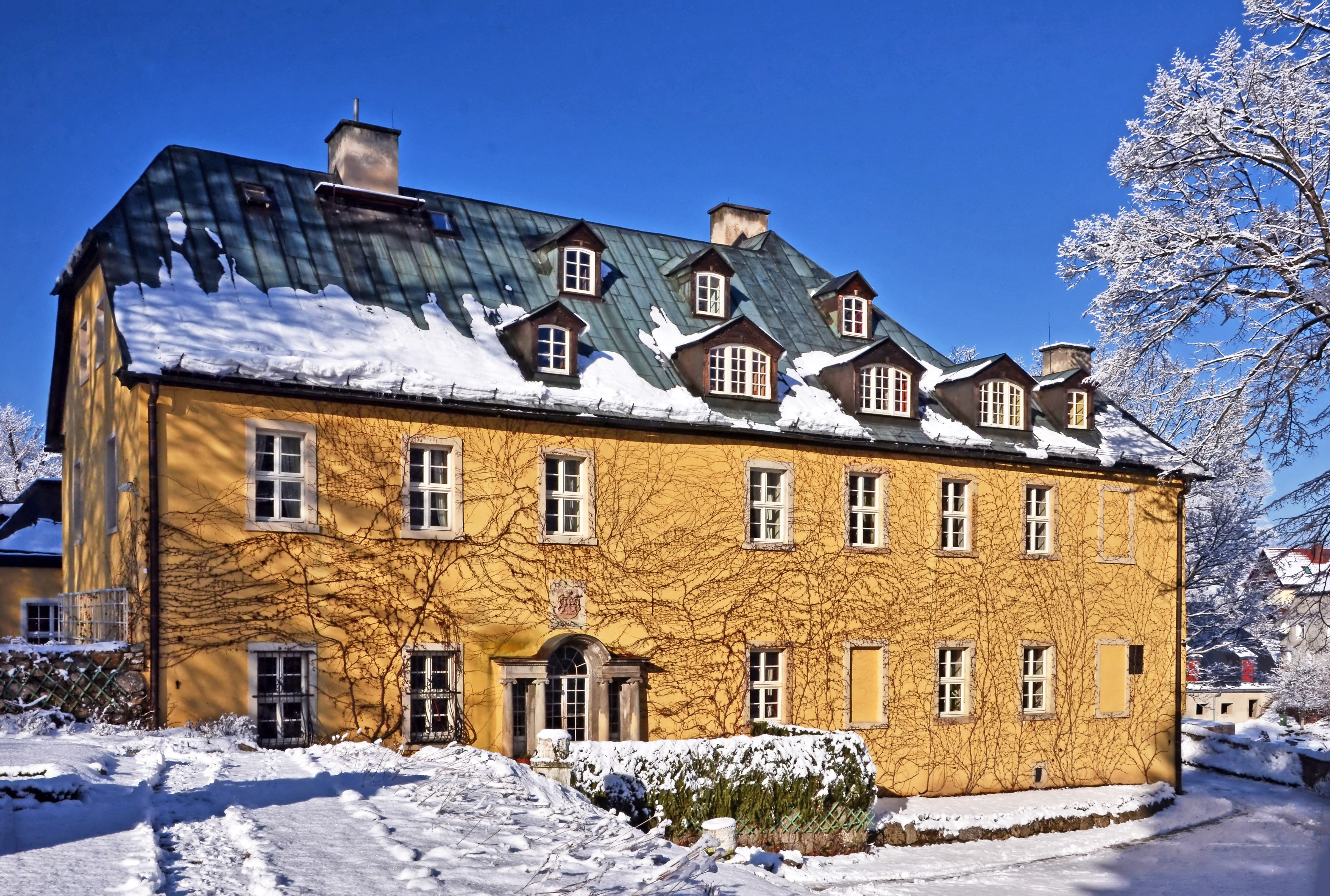 Pałac w Staniszowie, widok na elewację ogrodową (zabytek nr rejestr. A/781/878/J)